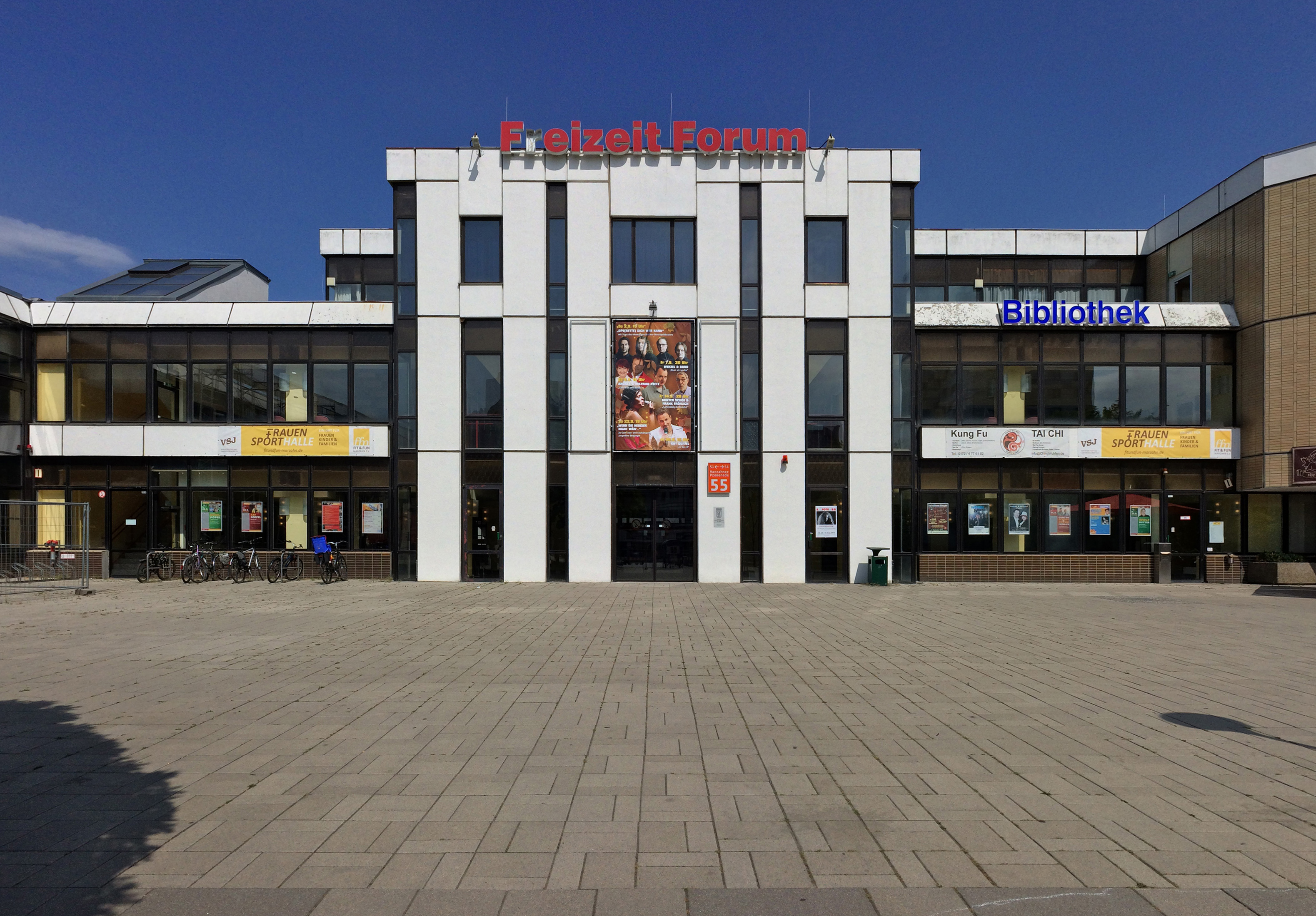 Freizeitforum Marzahn, Marzahner Promenade, Victor-Klemperer-Platz, Berlin-Marzahn, Entwurf 1983–1988, Ausführung 1988–1992